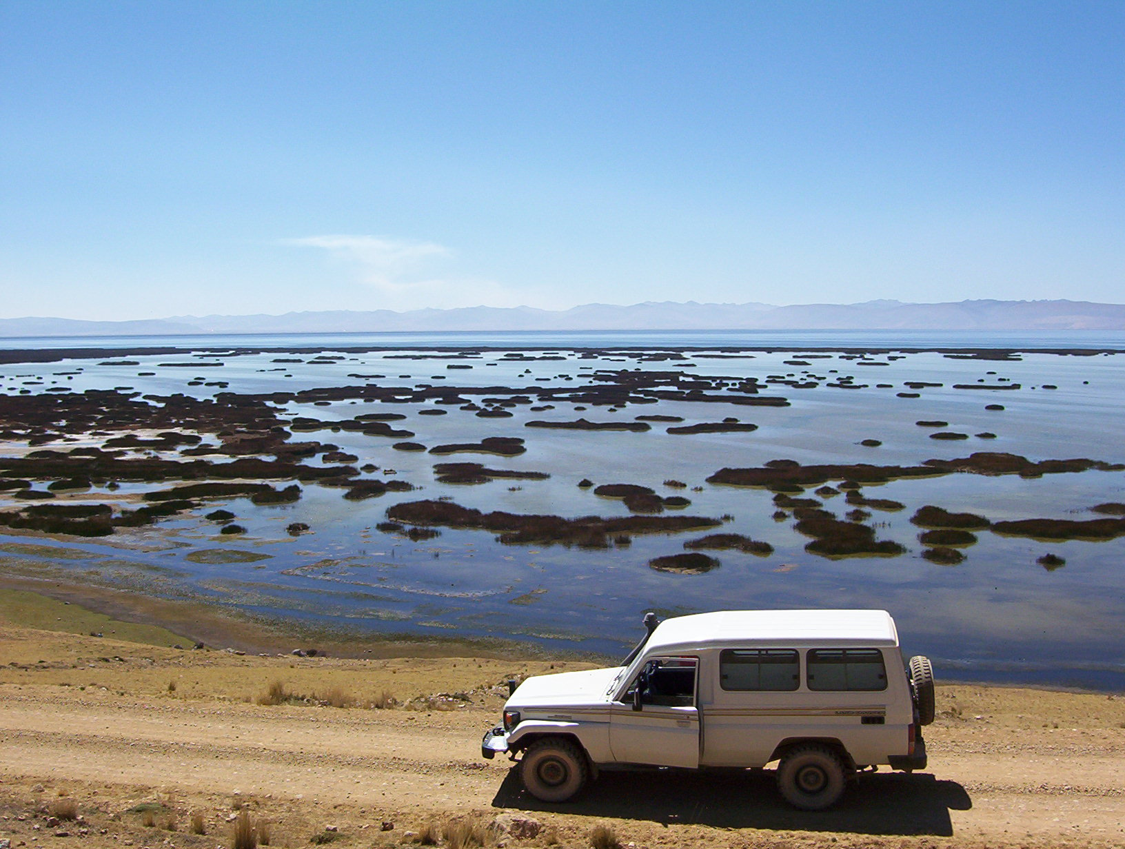 Lago de Junin, Peru